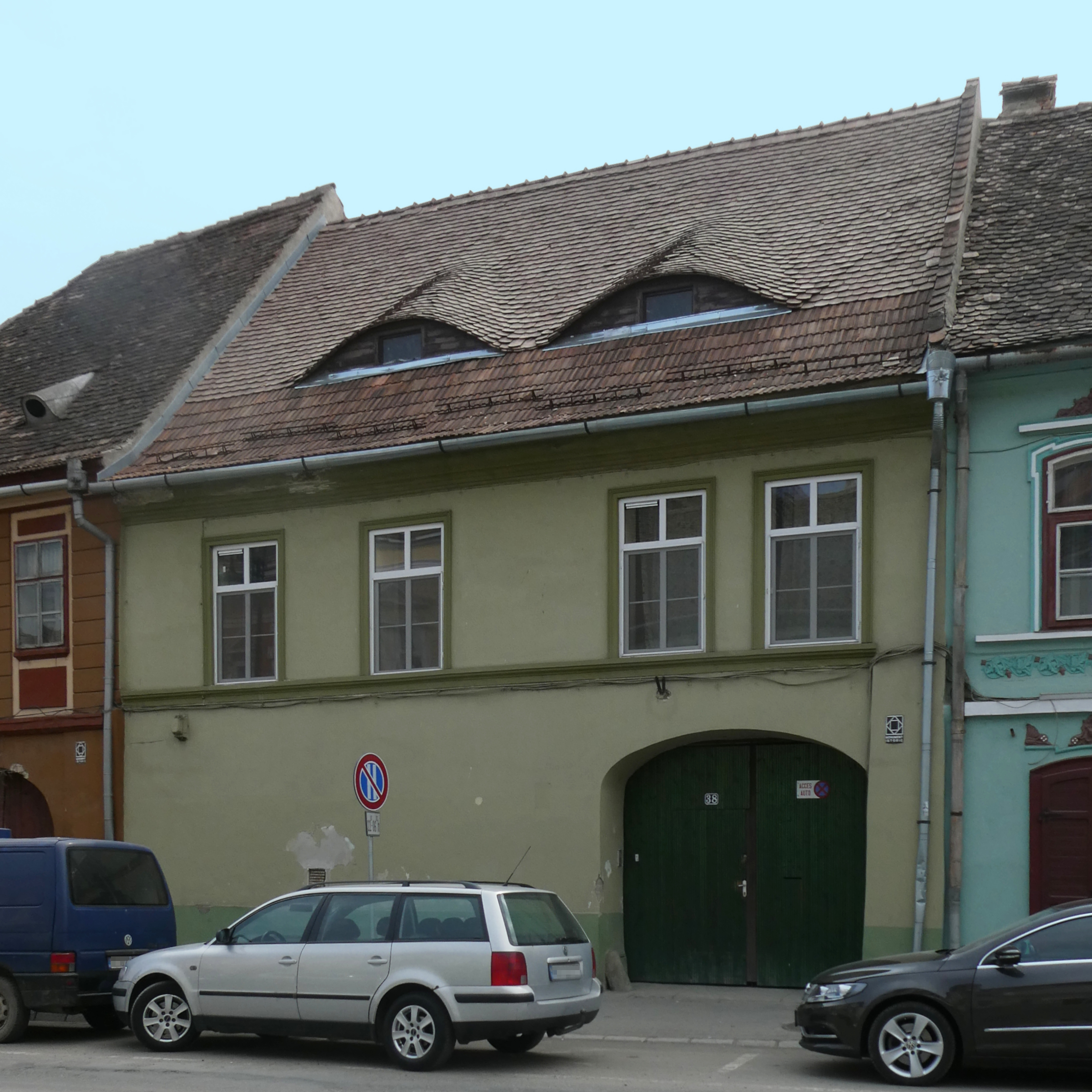 Schäßburg (RO), Haus str. 1 Decembrie 1918, 32.